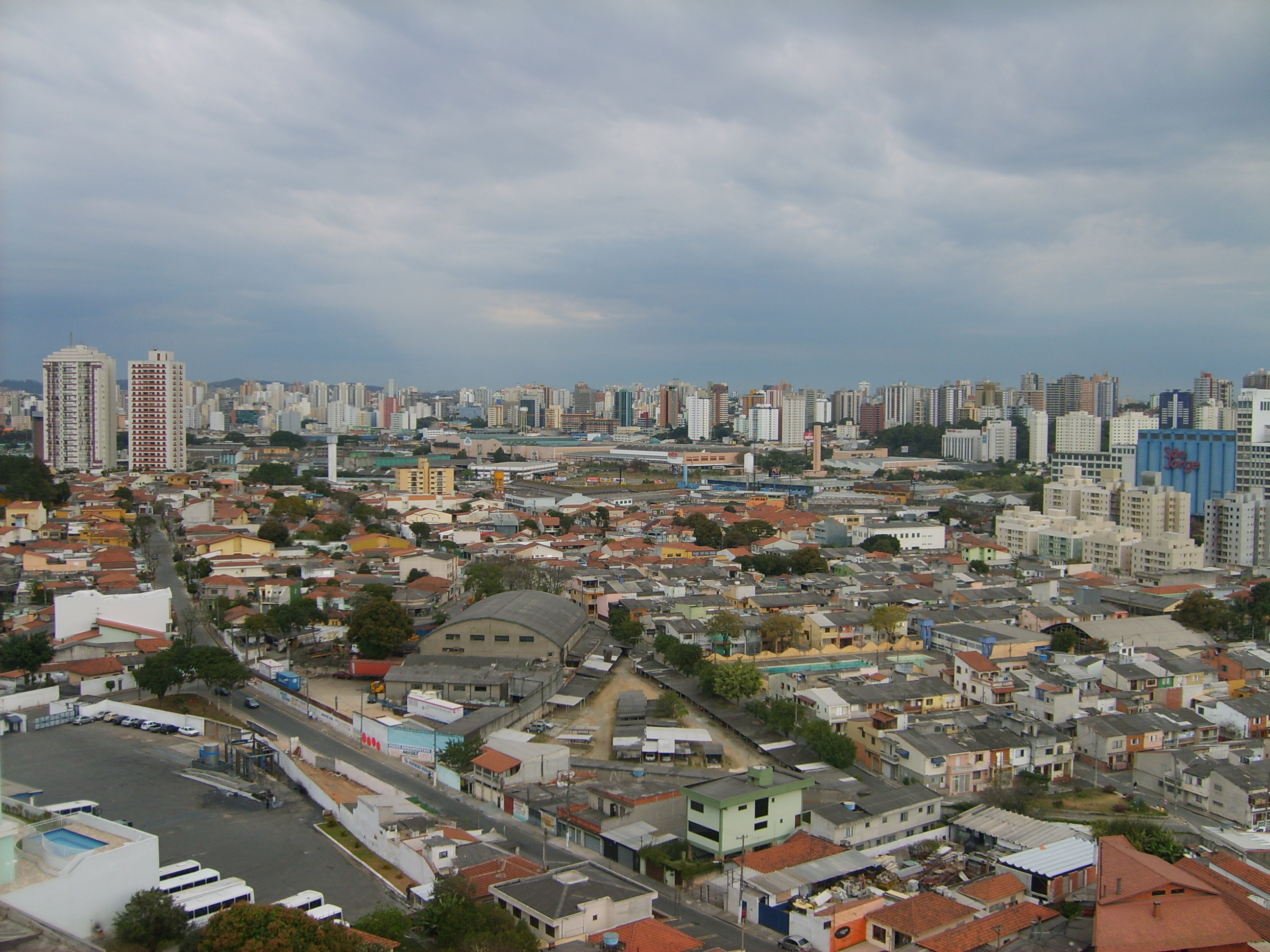 Vista aerea de Santo André, São Paulo, Brasil.